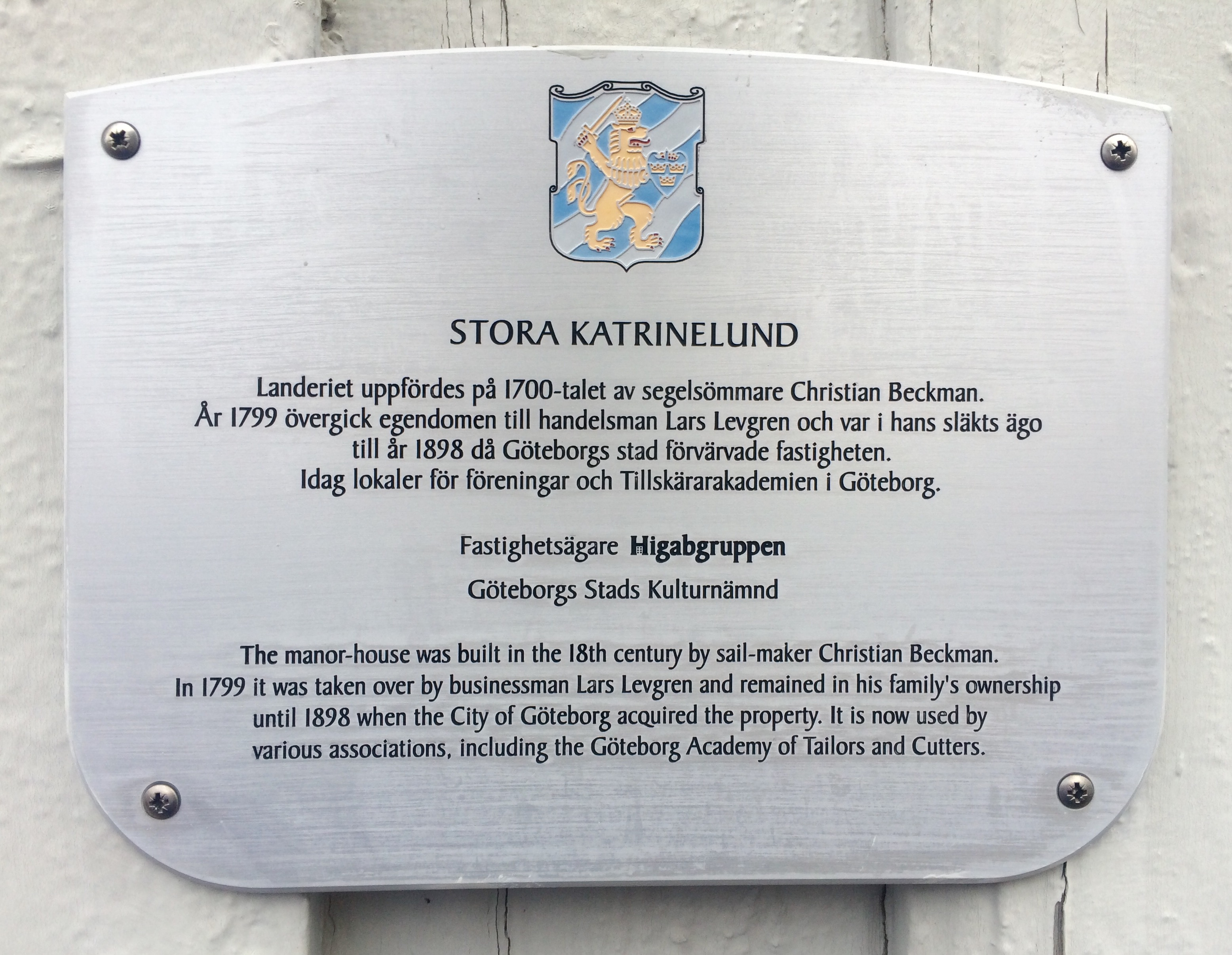 Informationsplakett om landerigården Stora Katrinelund i Göteborg, uppsatt bredvid entrédörren. Plaketten uppsattes som en del av Göteborgs stads kulturnämnds "Projekt Husmärkning" kring år 2000/2001 där drygt hundra skyltar ingick (ca 10 skyltar per månad). Se även boken "100 utmärkta hus i Göteborg". Vid en inventering av kommunen gjord 2016 satt 69 skyltar fortfarande uppe.